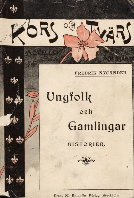 Nycander, Fredrik: Ungfolk och gamlingar. Book cover